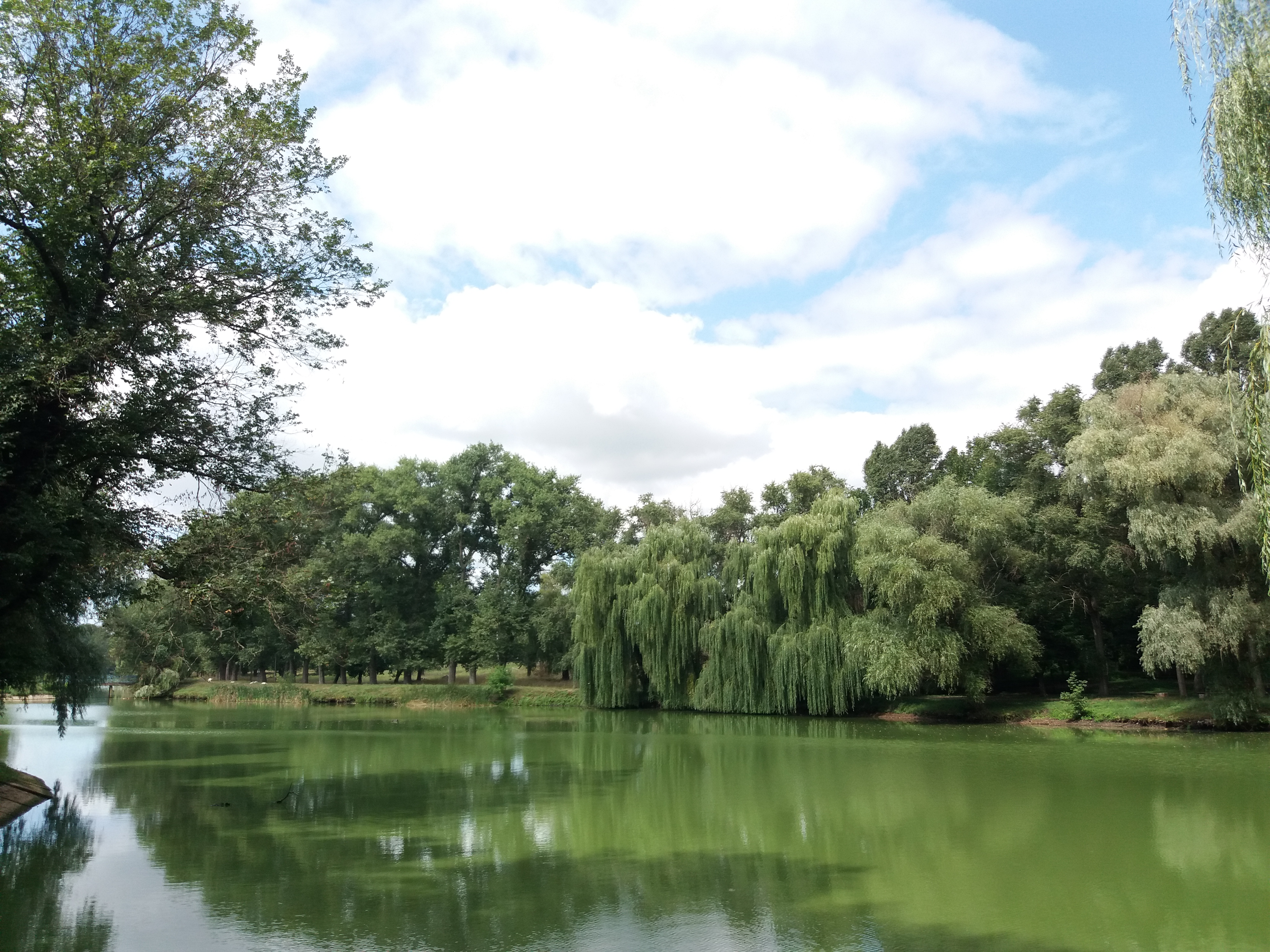 «Онуфріївський парк», Онуфріївський р-н, смт. Онуфріївка